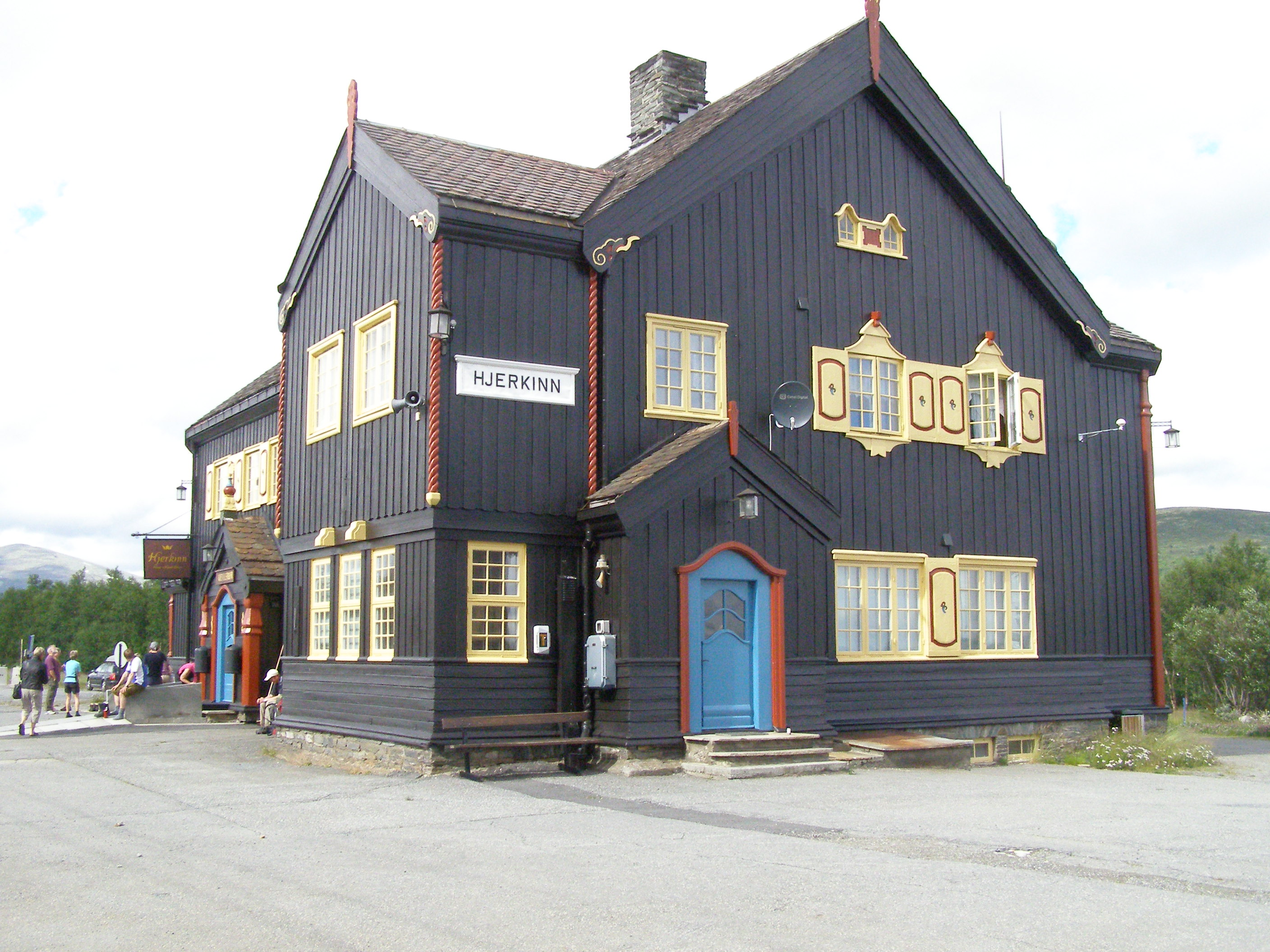 Hjerkinn Station, Norway